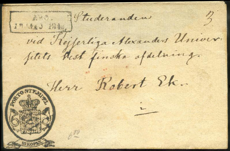 Штемпельный конверт Великого княжества Финляндского, 1848